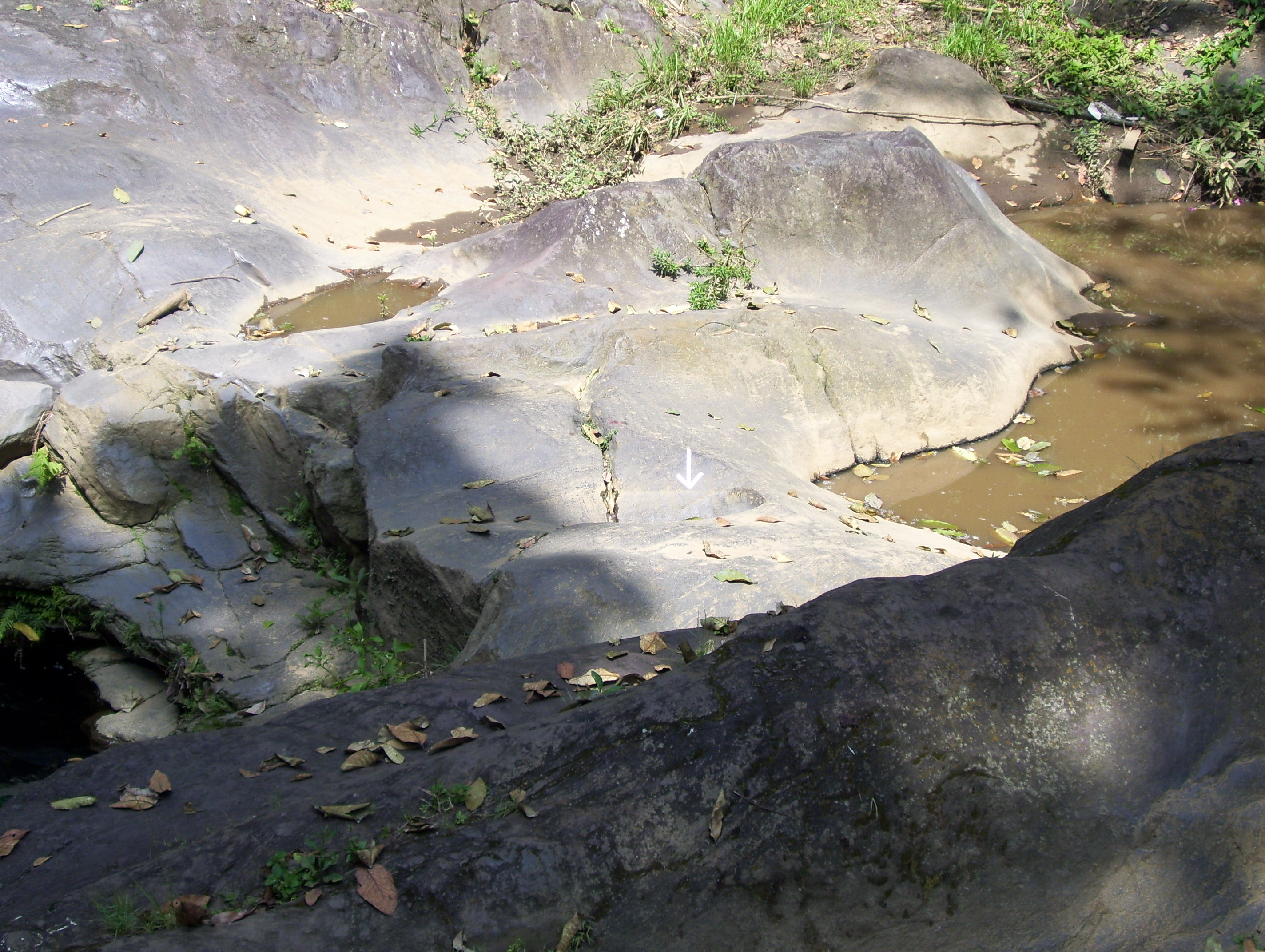 Rodilla del Diablo — en el Parque Nacional Urupan, Barranca del Cupatizio, Municipo de Uruapan, Michoacan, México.